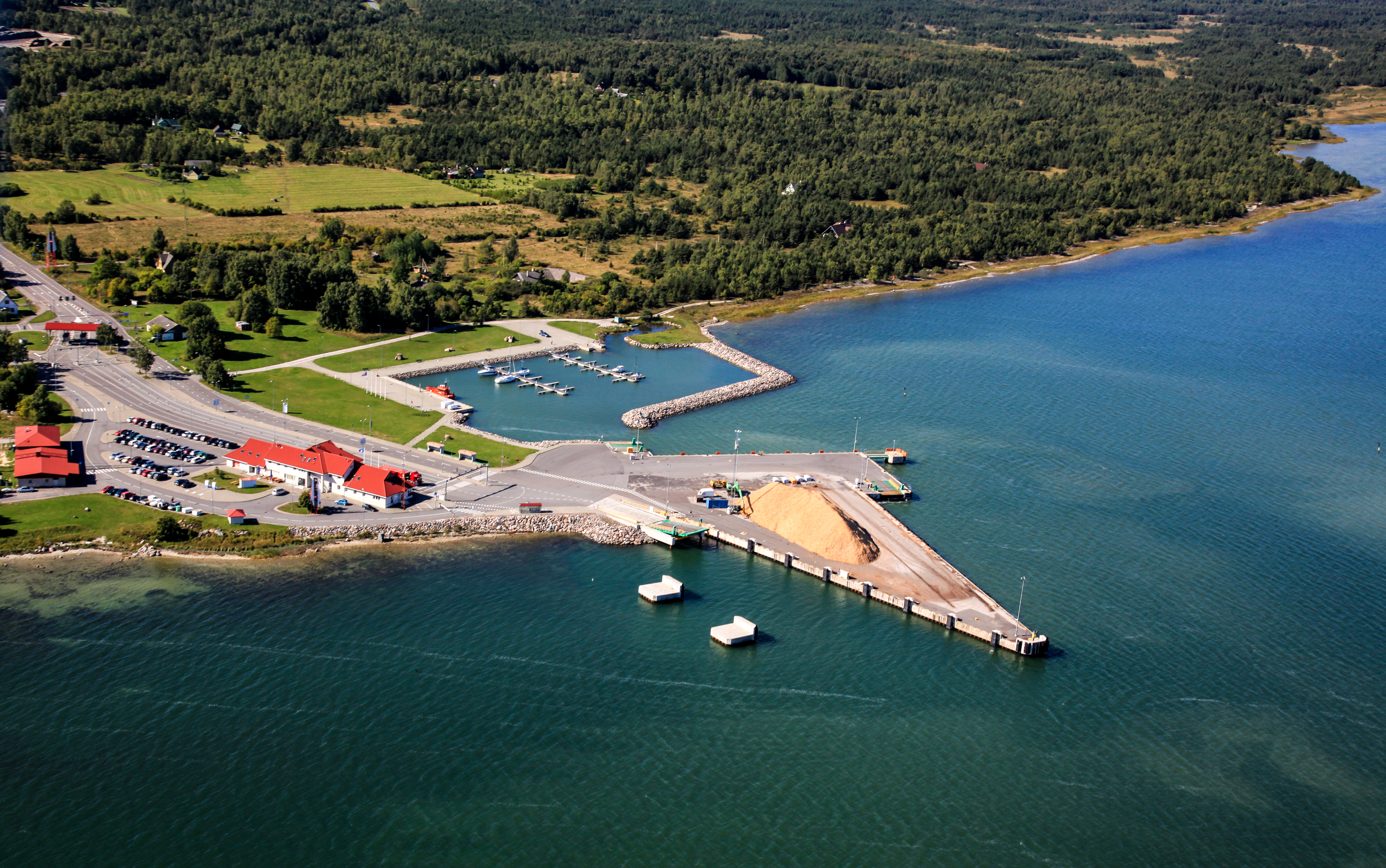 Heltermaa sadam 2015